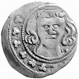 Kwartnik Henryka III. Awers. autor: mzopw licencja: GNU FDL